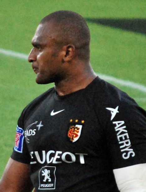 Maleli KUNAVORE lors de la demi-finale de top 14 2008-2009 opposant Clermont à Toulouse